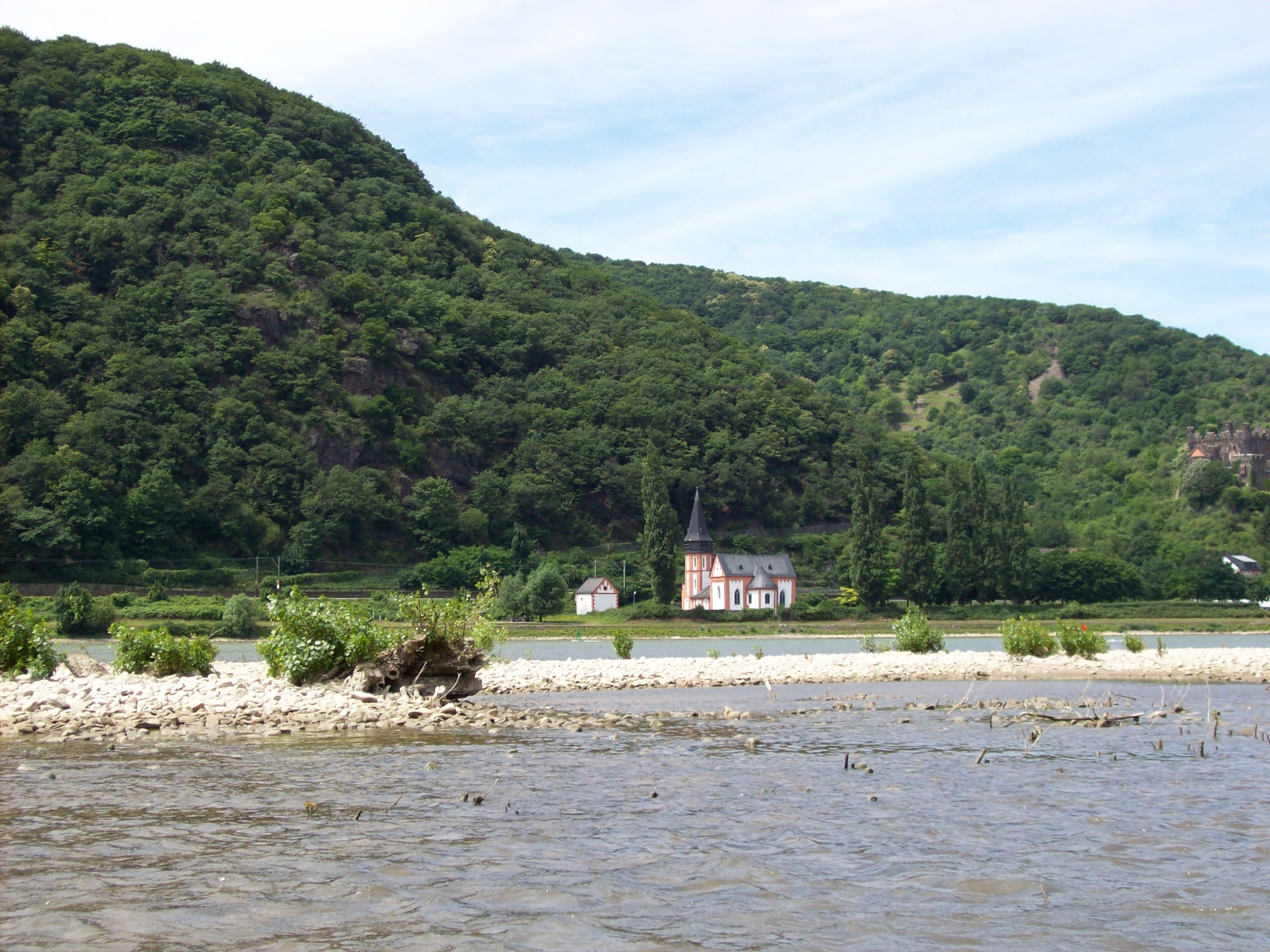 Clemensgrund (Rhein) mit Clemenskapelle